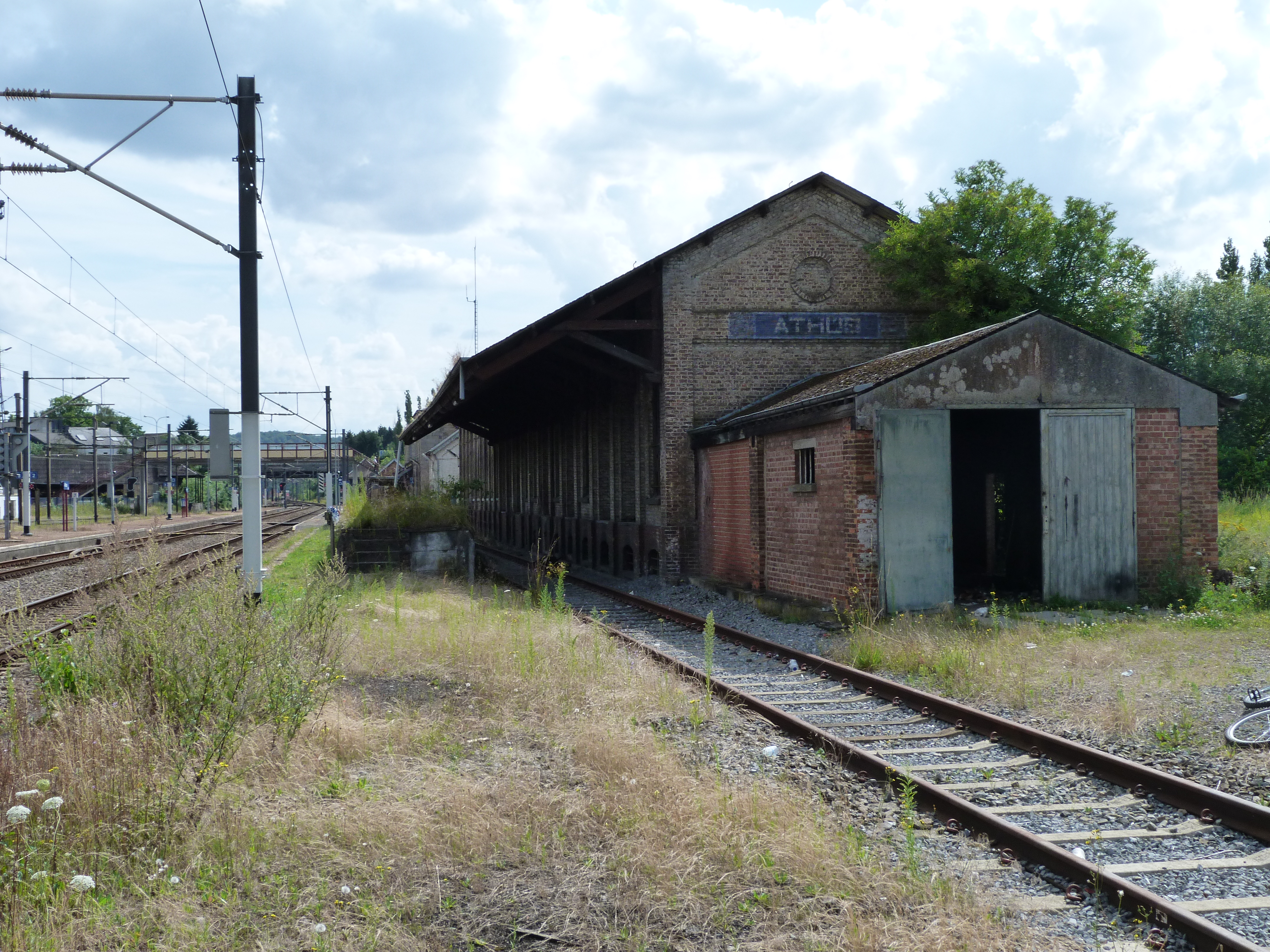 La gare désaffectée d'Athus